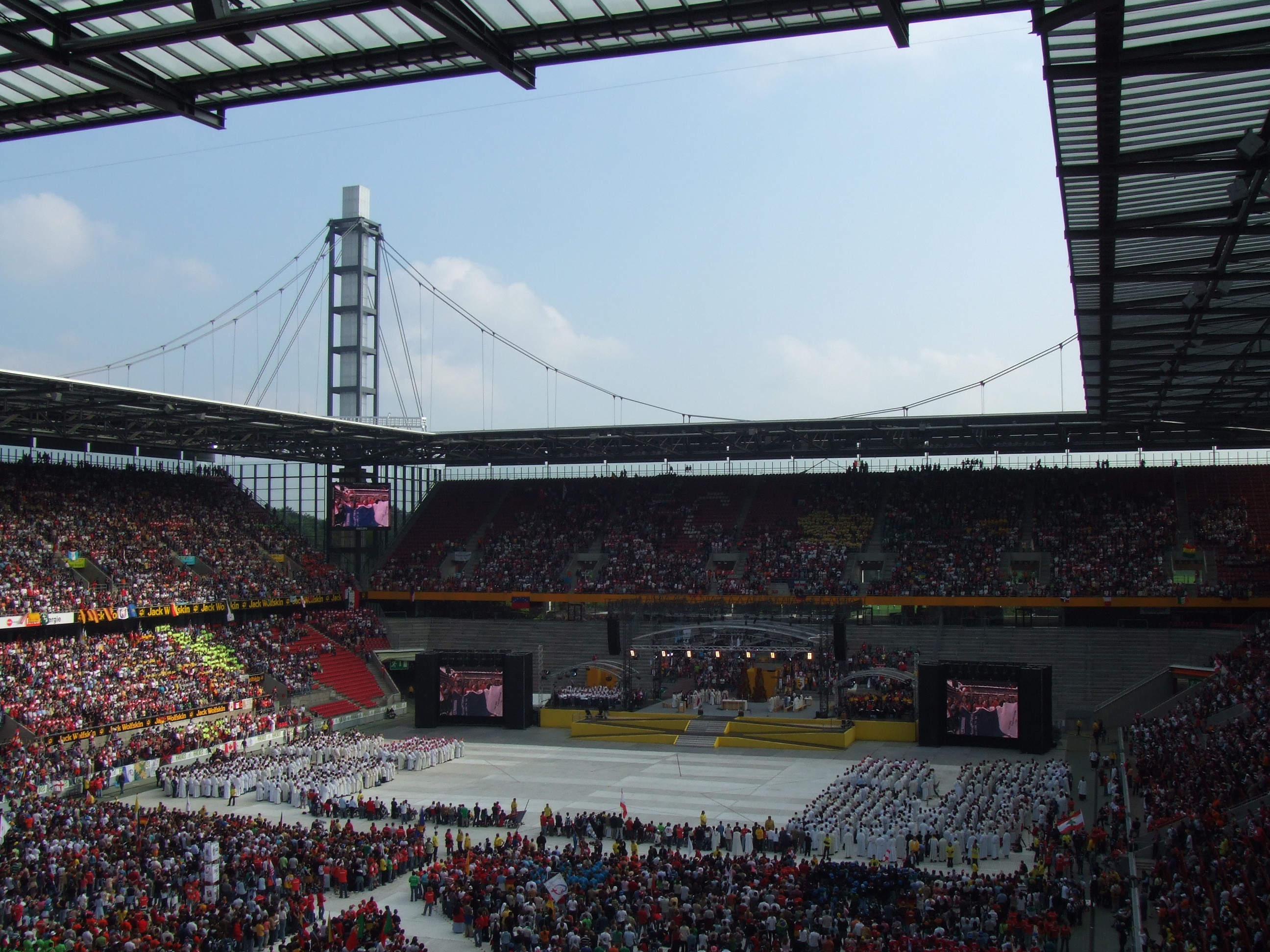 Rhein Energy Stadium WYD 2005, Germany